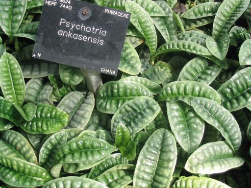 Psychotria ankasensis, photo prise aux jardins de Kew, à Londres.